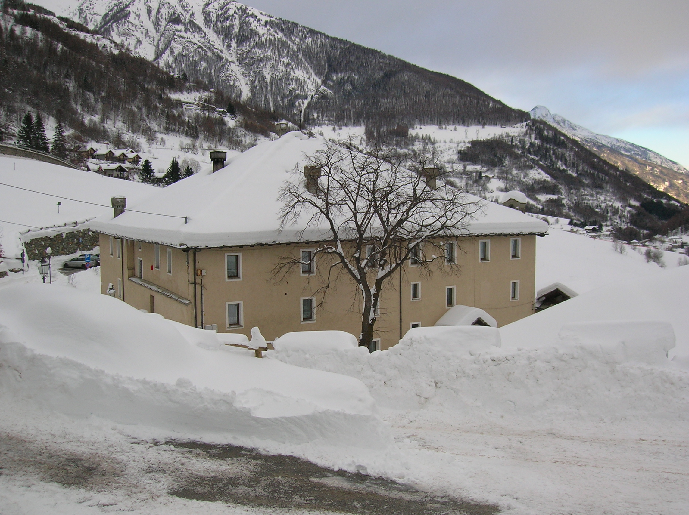 Esterno del Château Verdun in inverno, Saint-Oyen, Valle d'Aosta, Italia.